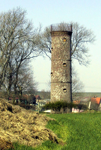 La tour du télégraphe de Chappe à Lefaux, Pas-de-Calais, France.